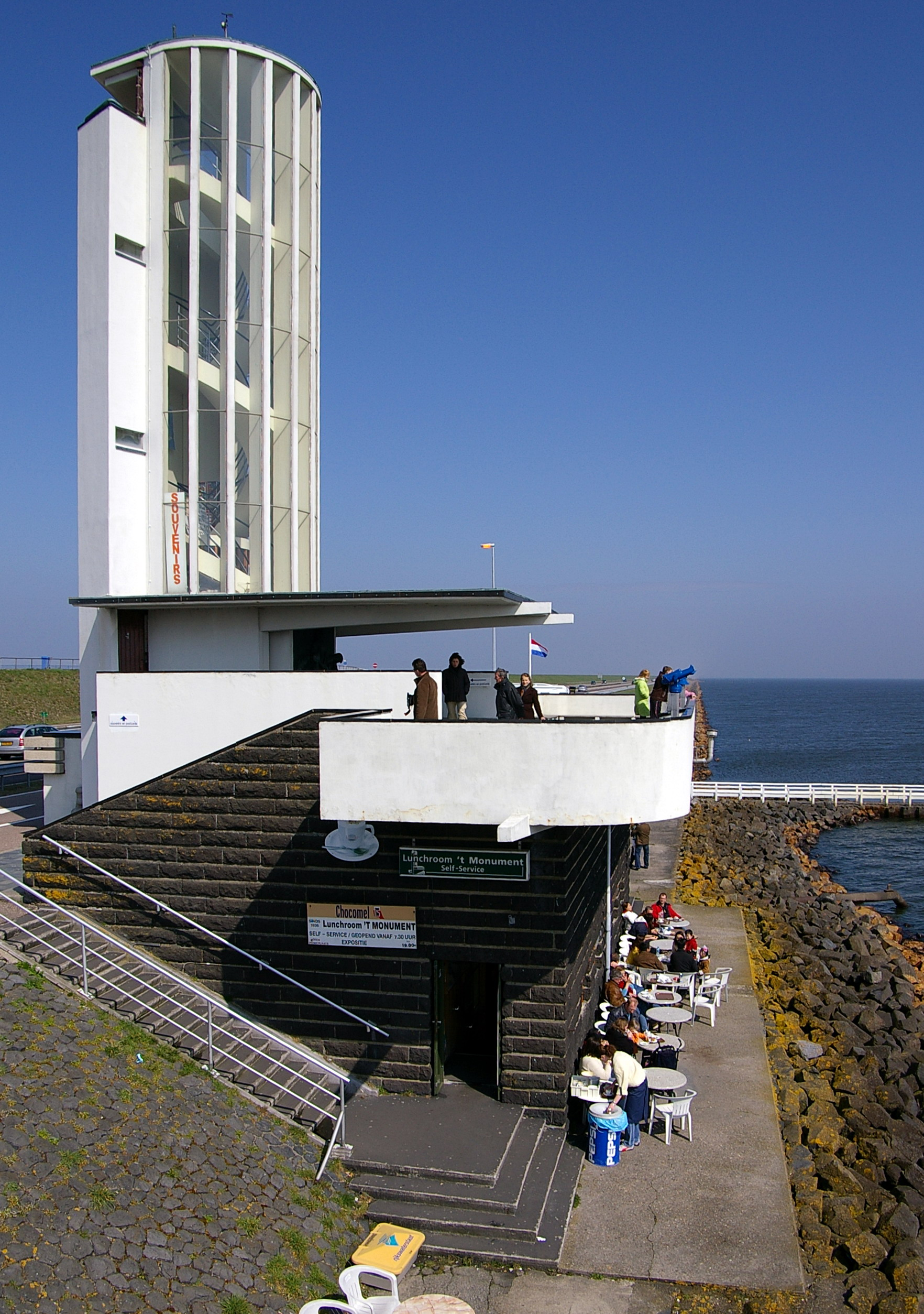 Der Aussichtsturm auf der ersten Halbinsel des Abschlussdeiches in den Niederlanden, aufgenommen von der Fußgängerbrücke über die Straße jpg